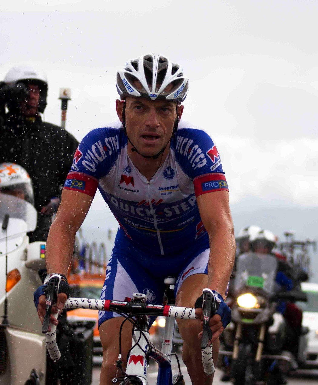 col de manse 054 dries devenyns